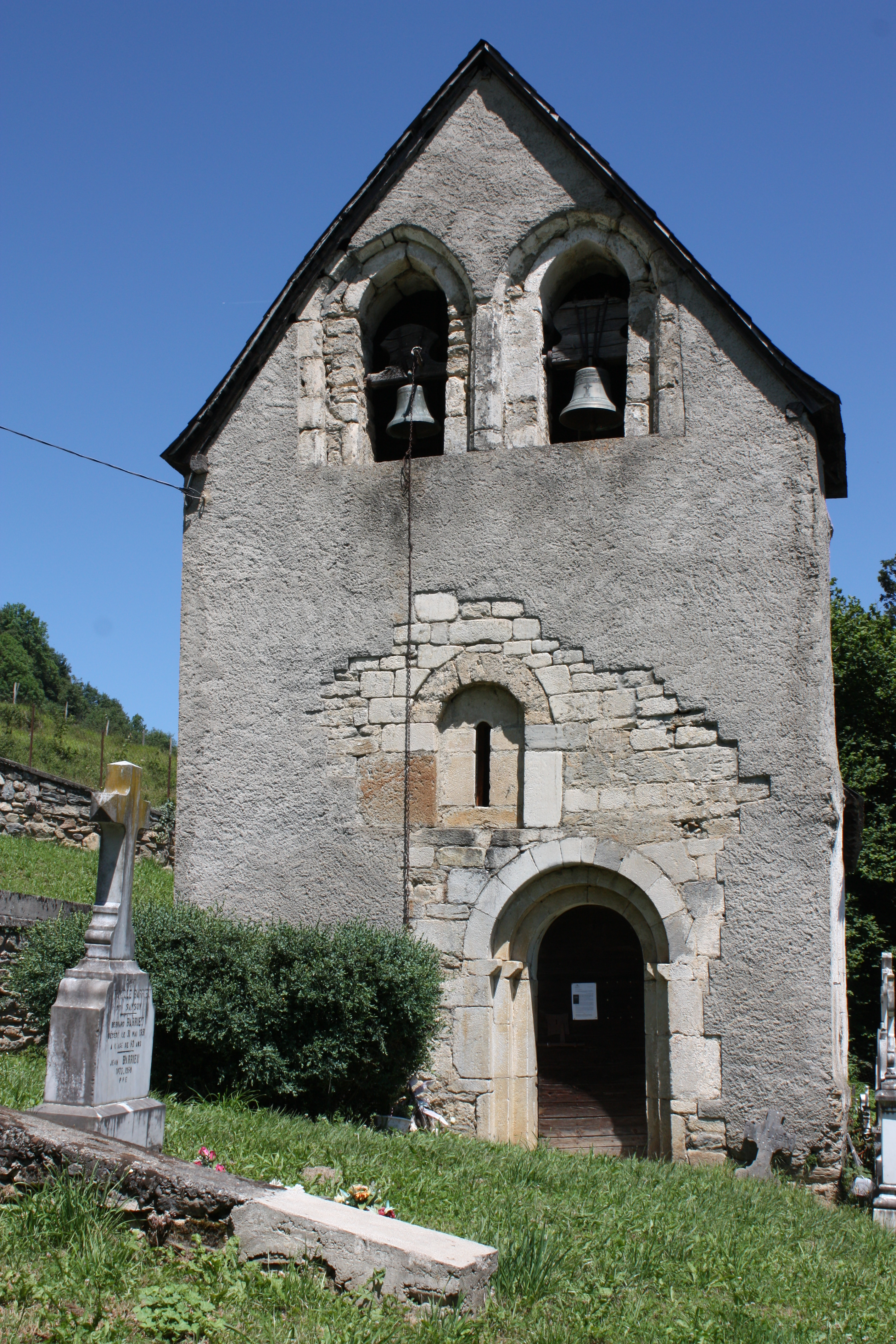 Binos - Eglise Saint-Laurent Façade Ouest